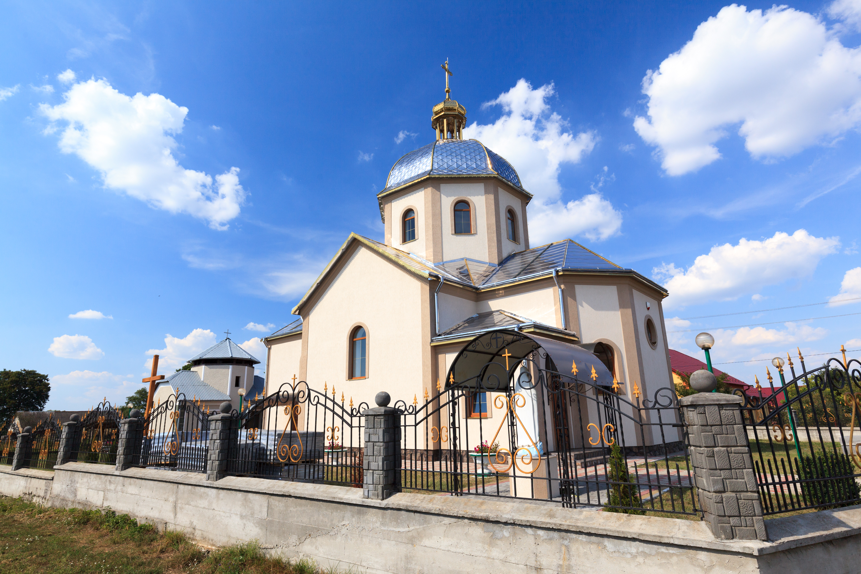 Церква Зачаття Св.Івана Хрестителя(дер.), с.Передбір”я